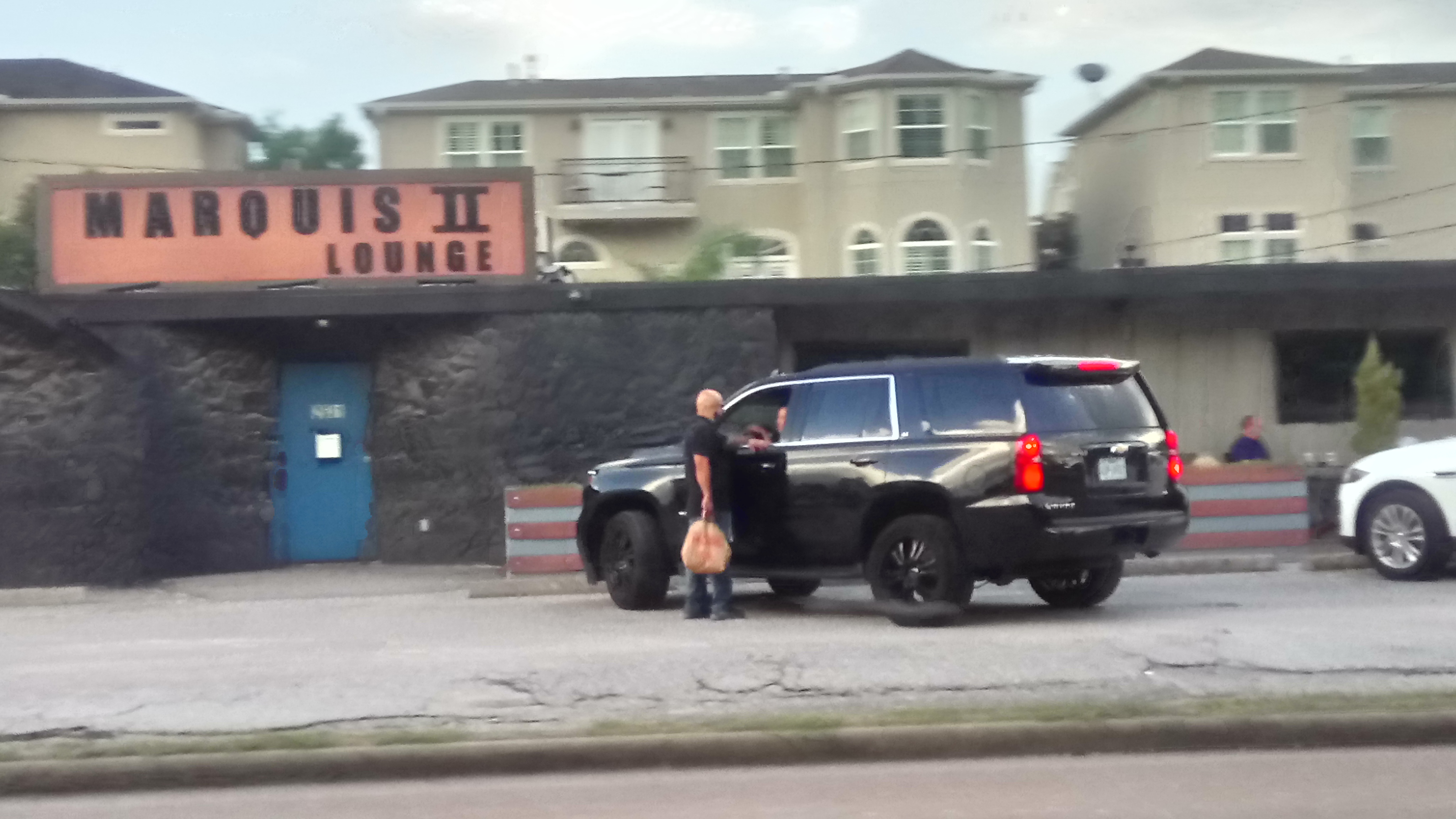 Marquis II bar